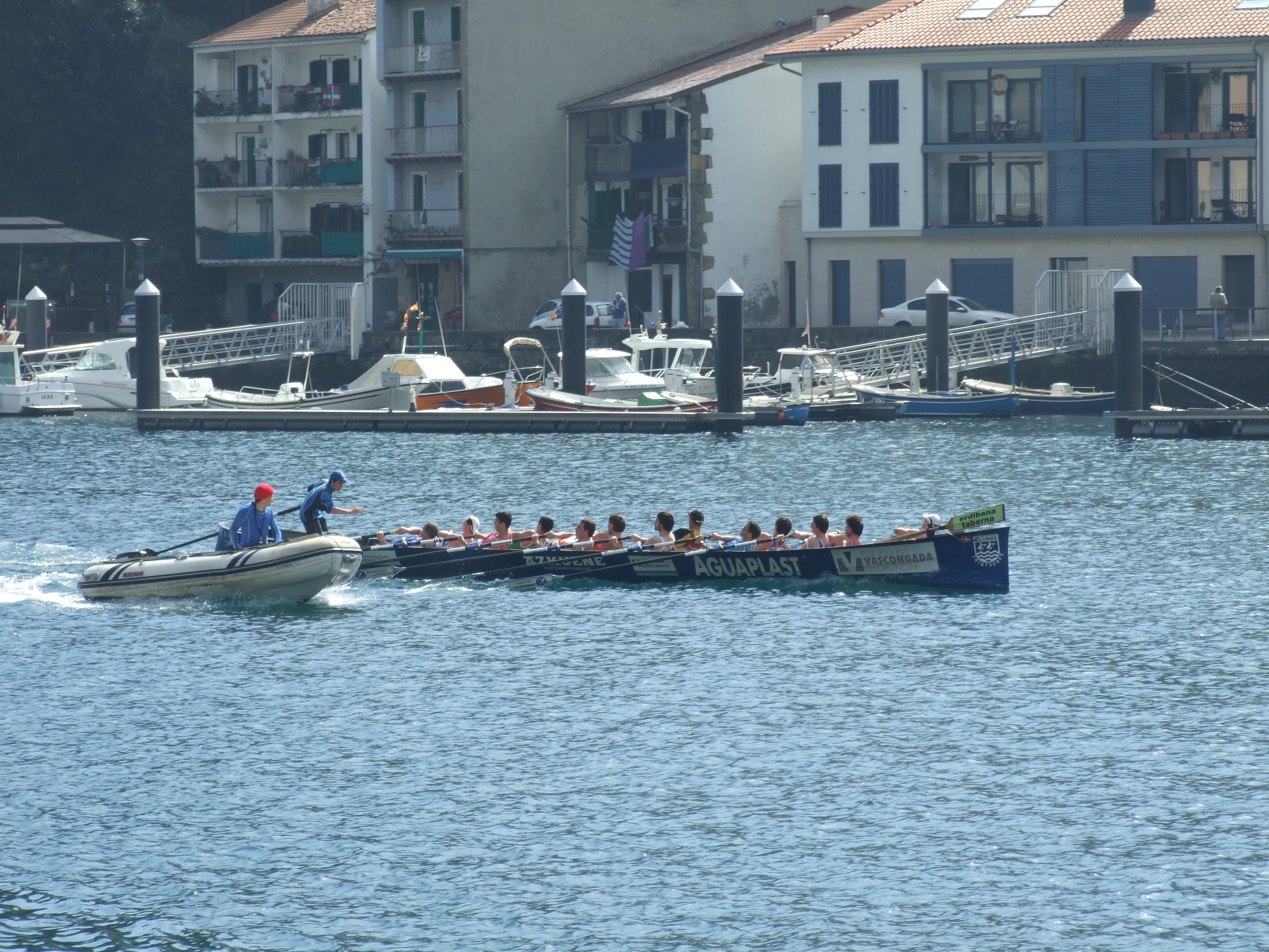 Entrenamiento de la trainera deTrintxerpe saliendo del puerto en abril de 2014.